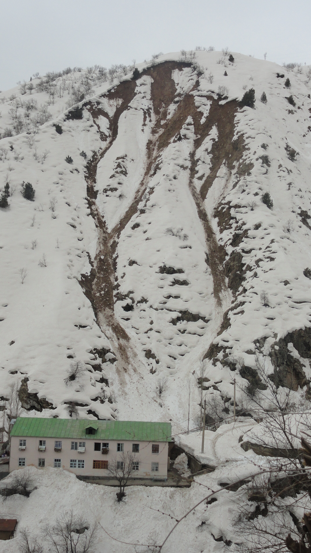 Крутой склон Ходжа Оби Гарм Тоҷикӣ: Осоишгоҳи Хоҷа Оби гарм, Сароб.